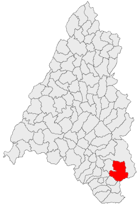 Categorie:Hărţi ale judeţului Bihor